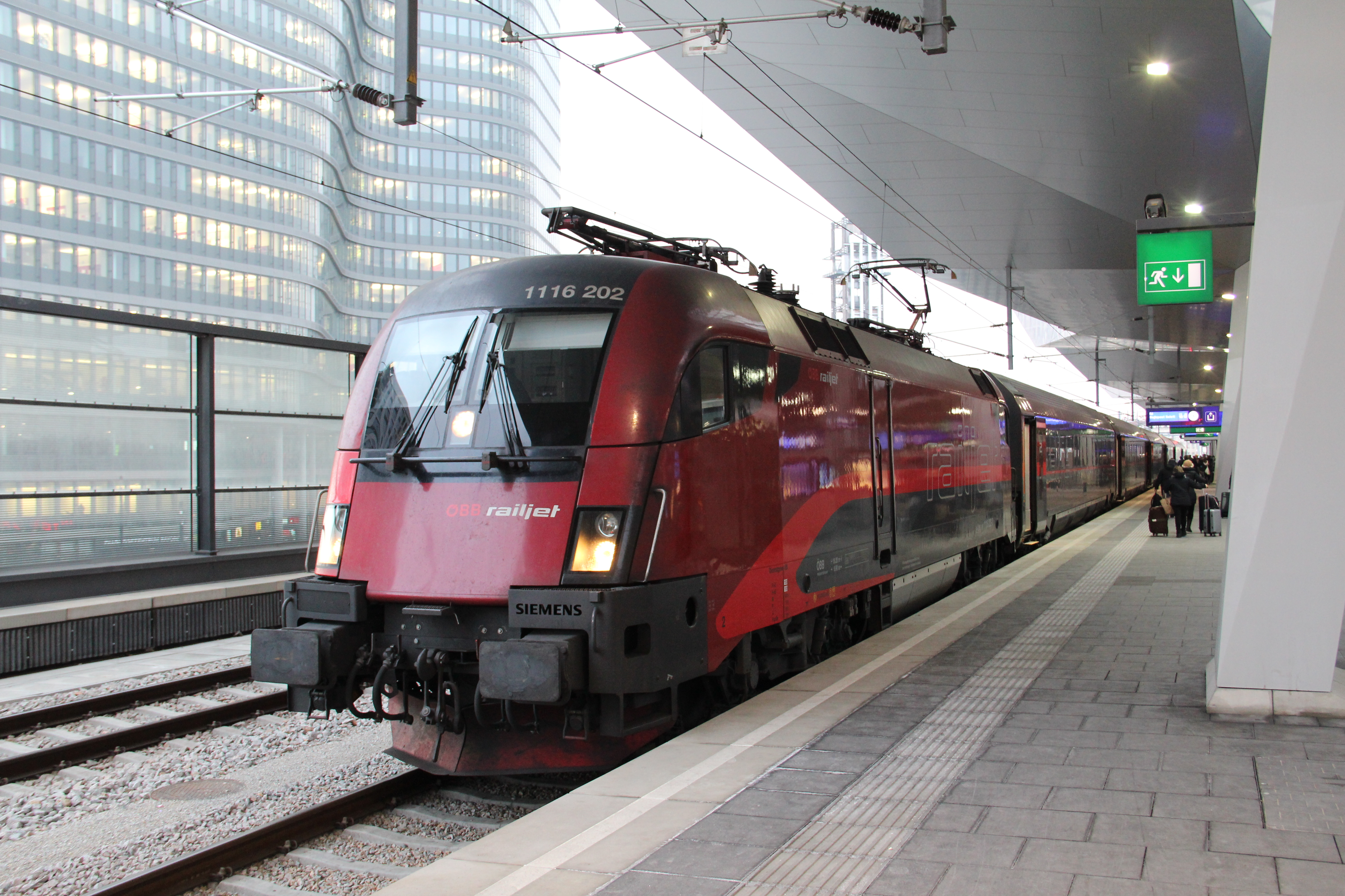 RJ 65 mit 1116.202 an der Spitze steht hier in Wien Hbf am Weg von München nach Budapest. Man beachte die rote Scheinwerferabdeckung links unten!